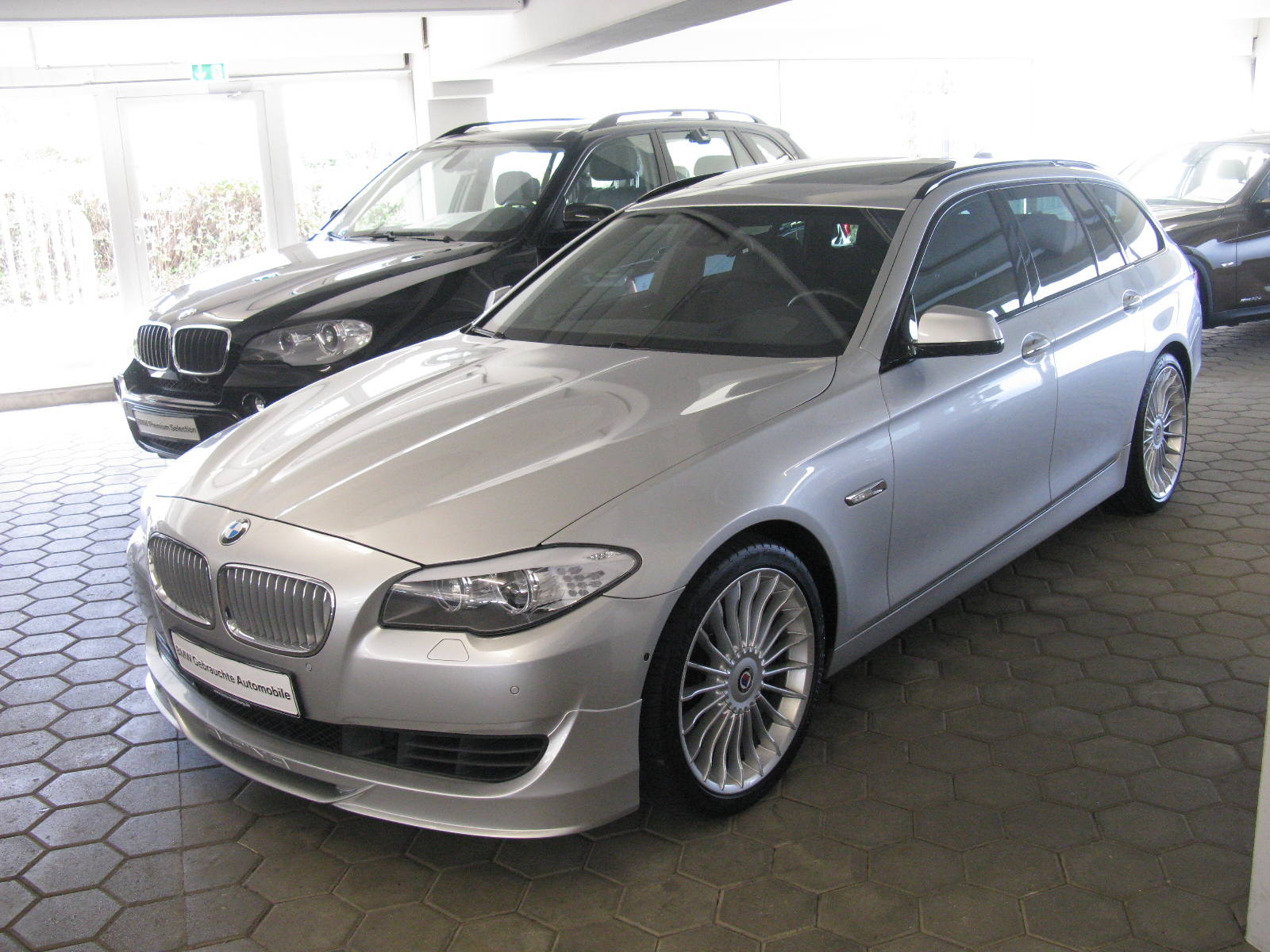 BMW Alpina B5 Touring F11